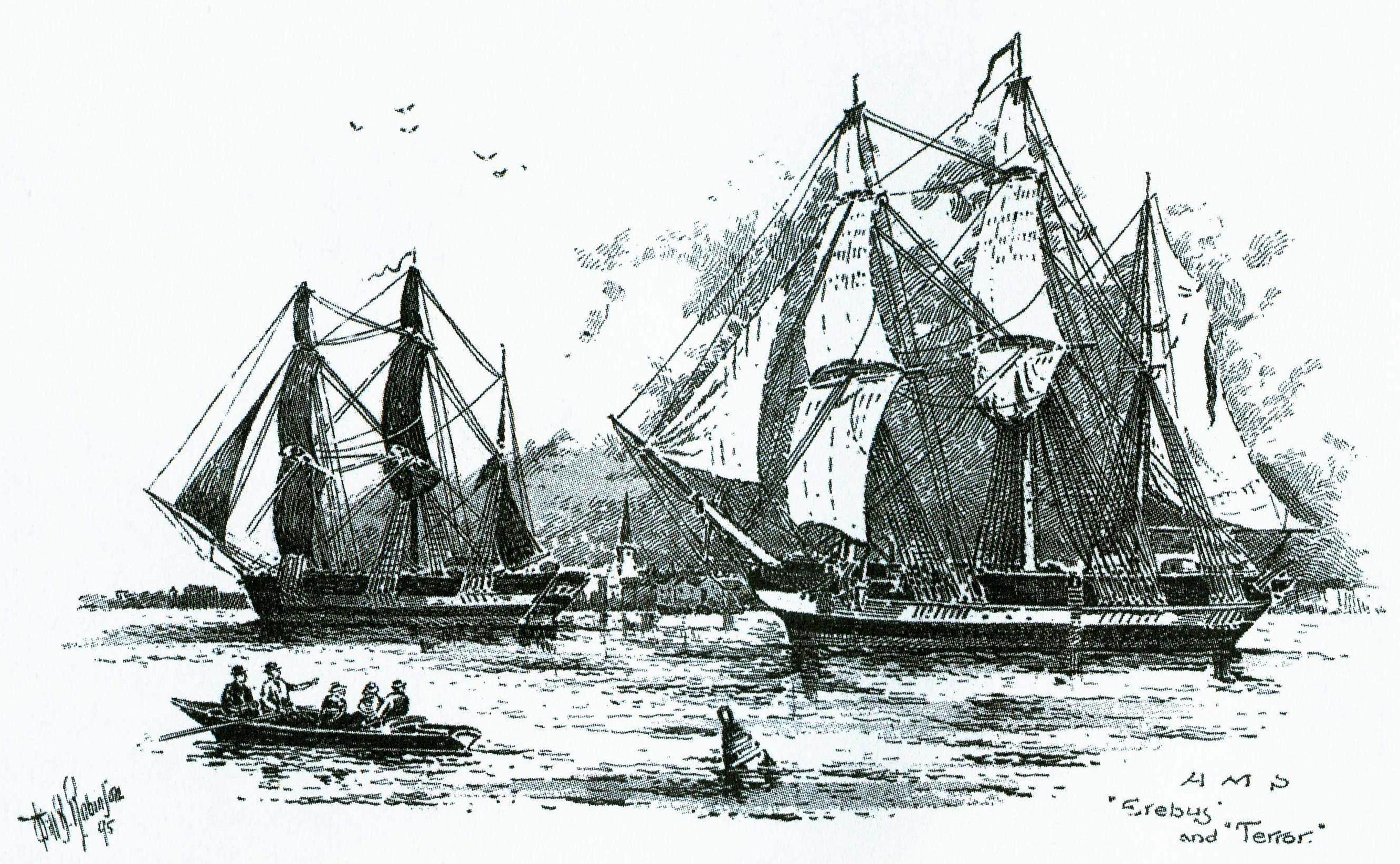 Die John Franklin-Expedition Mitte des 19. Jahrhunderts auf der Suche nach der Nordwestpassage